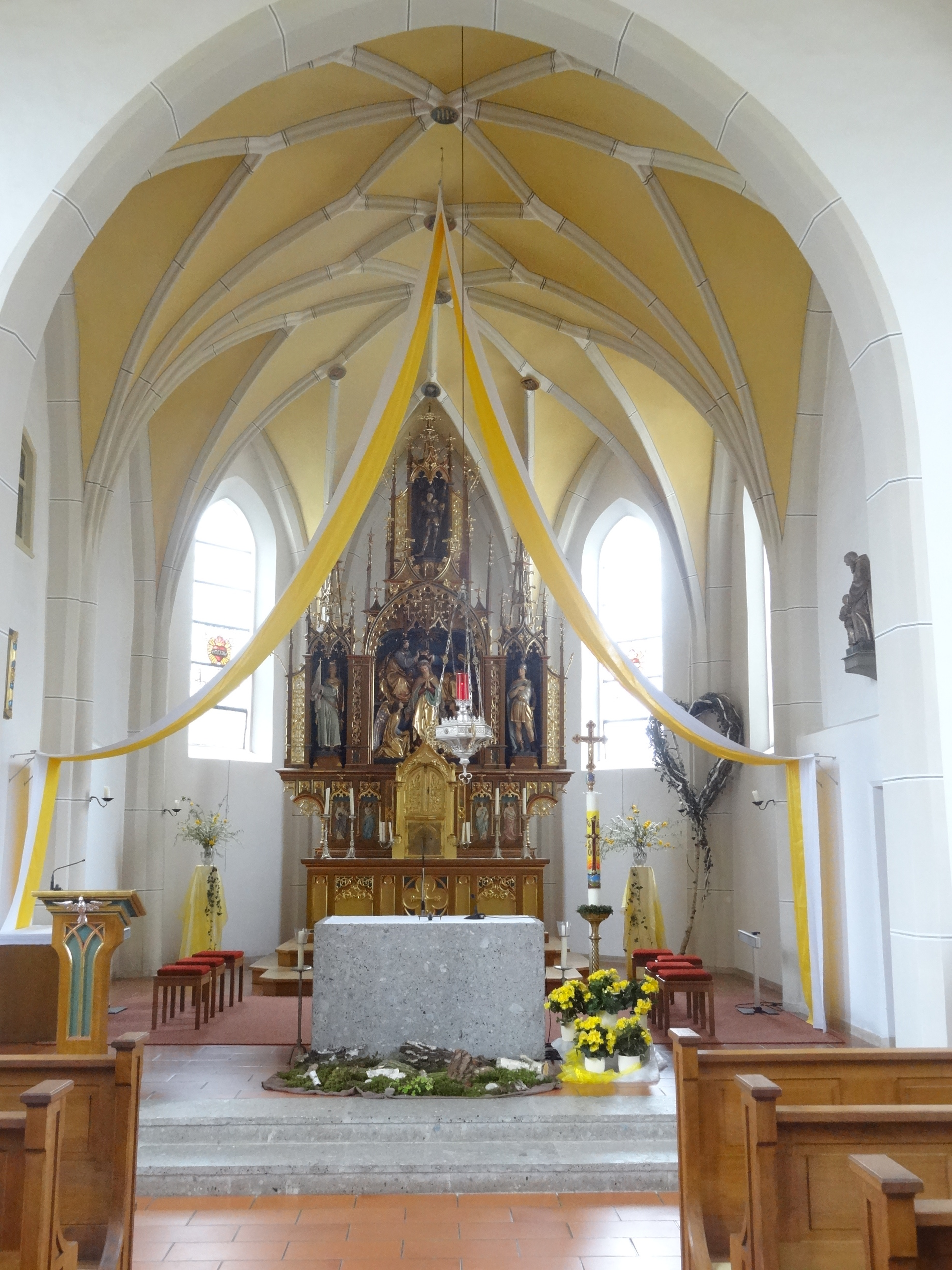 Chorraum der Pfarrkirche St. Kastulus in Vilsheim (Lkr. Landshut, Bayern)